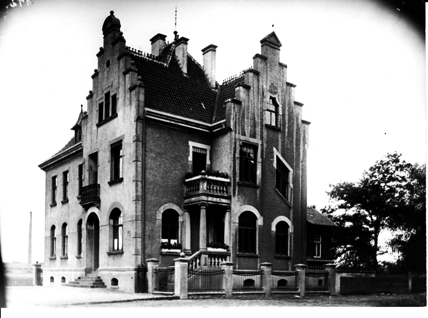 Ehemaliges Bürgermeisteramt Hochemmerich, Moerser Straße, ca. 1915